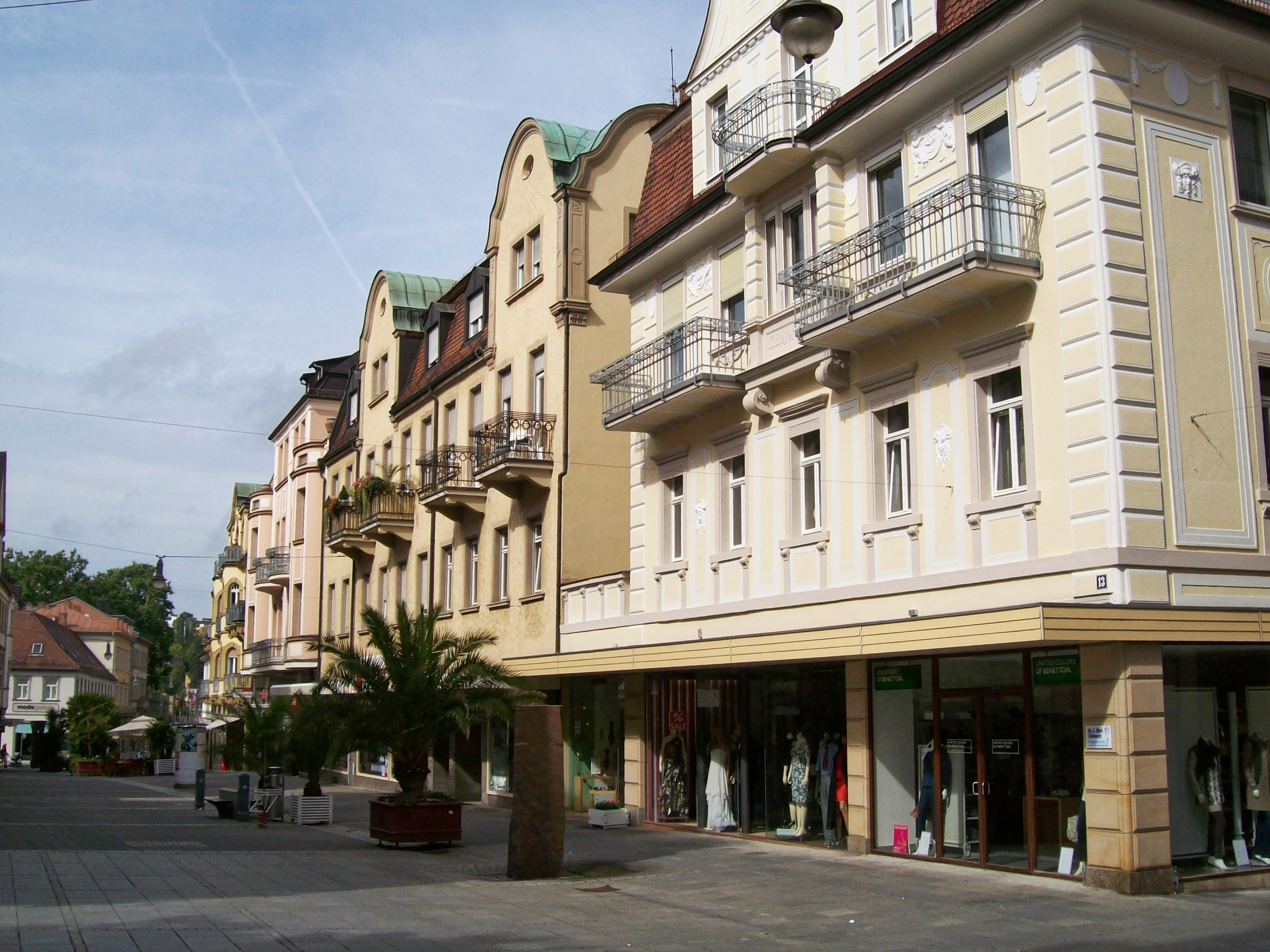 97688 Bad Kissingen, Germany